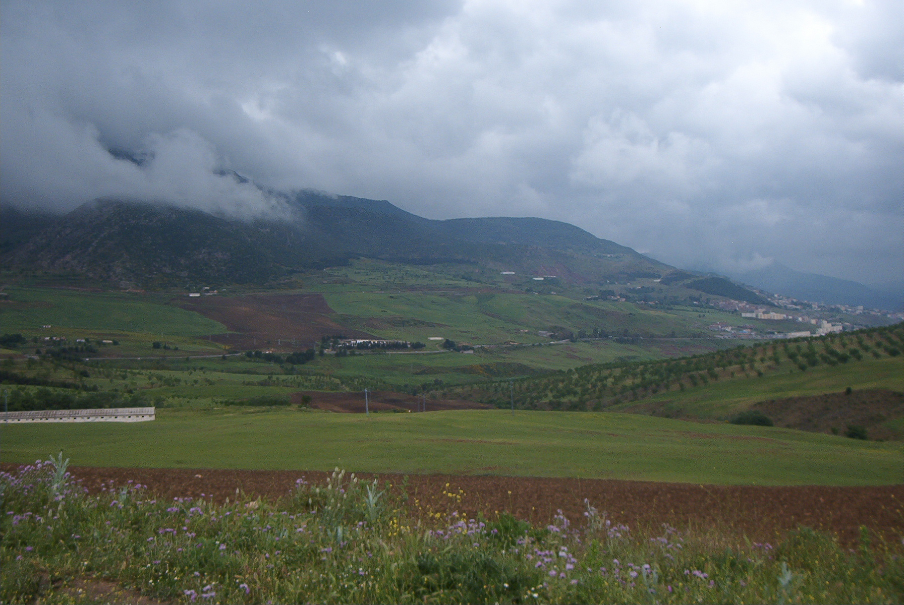 En vue de Bougaâ